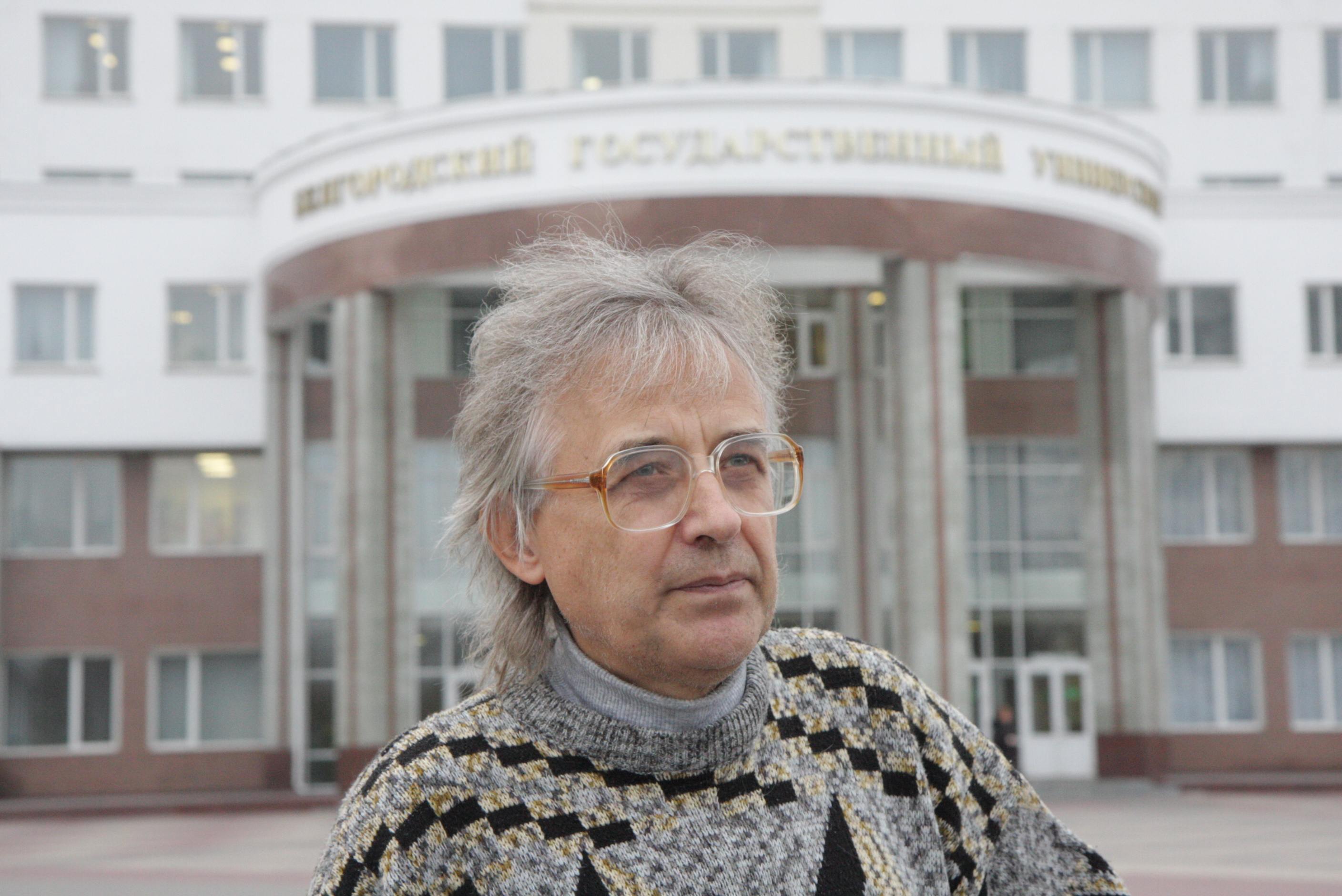 Московкин Владимир Михайлович (р. 1952) - доктор географических наук.